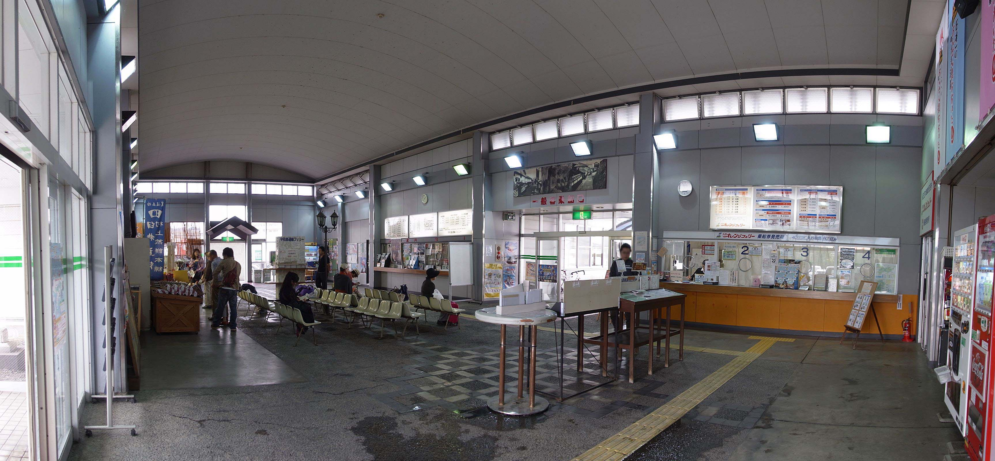 Usuki port Ferrie terminal , 臼杵港フェリーターミナル